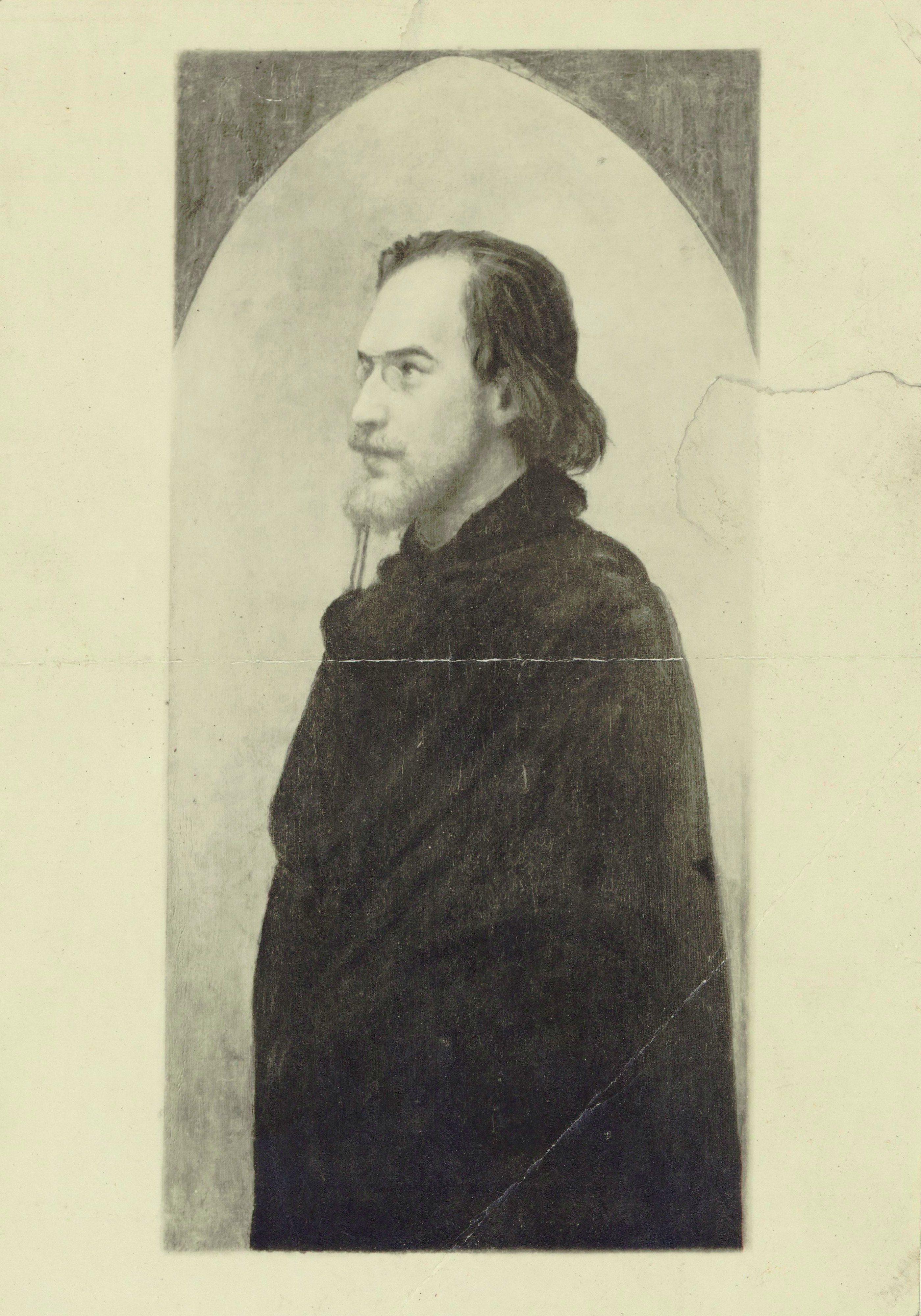 Erik Satie (1866-1925)